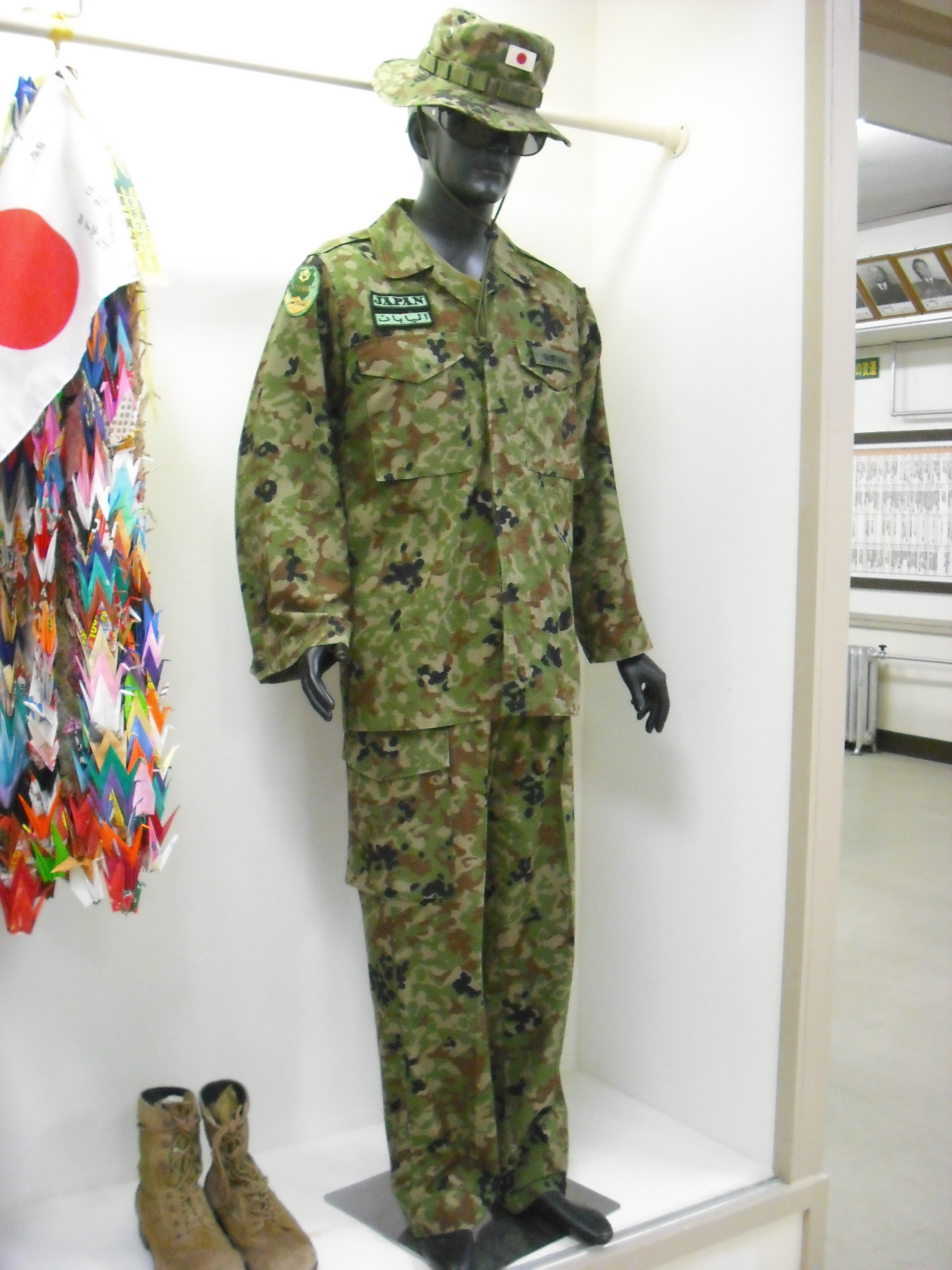 帯広駐屯地記念行事にて撮影